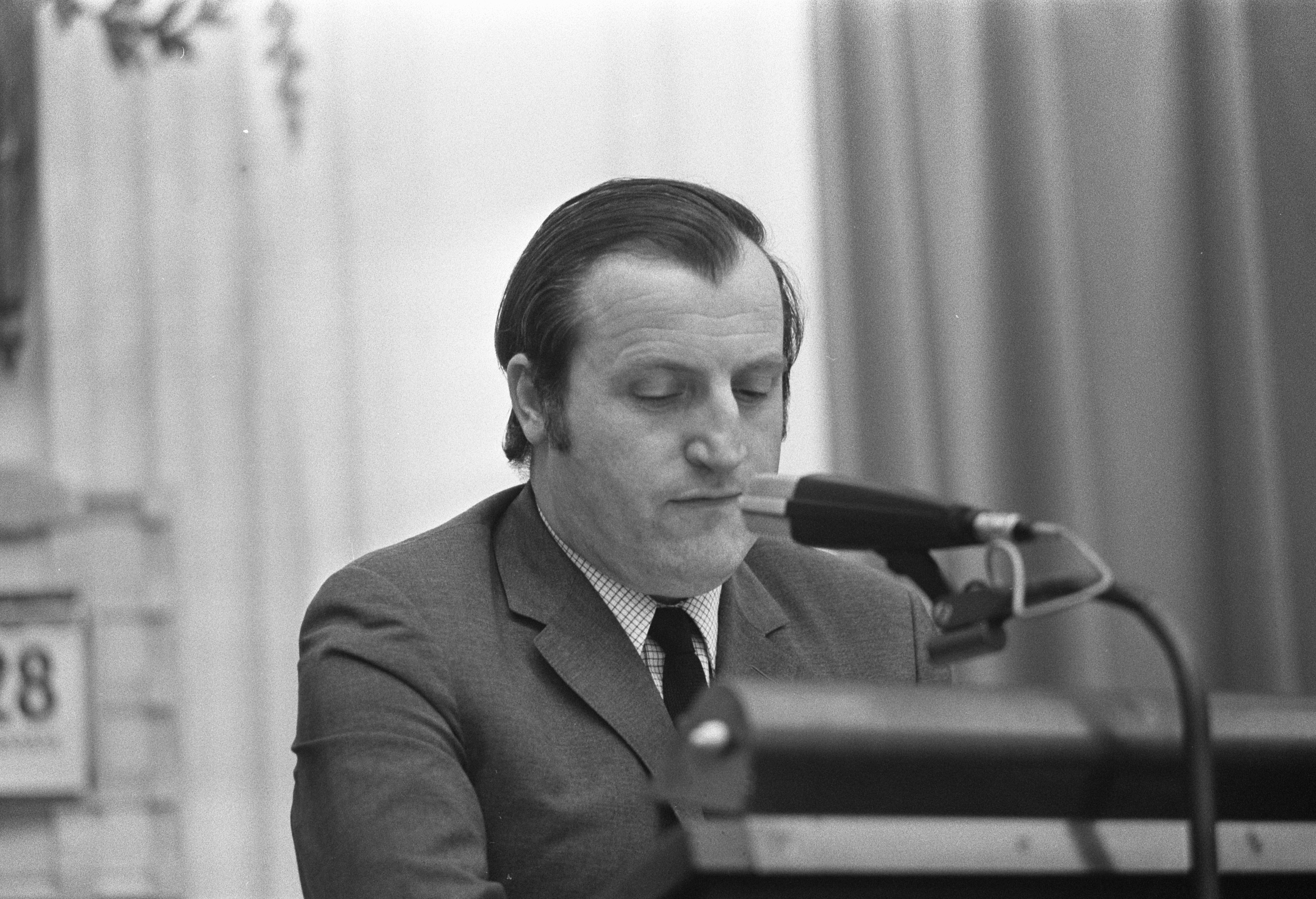 Collectie / Archief : Fotocollectie Anefo Reportage / Serie : [ onbekend ] Beschrijving : Kamerlid J.W. Masman (PvdA) tijdens een debat in de Tweede Kamer in Den Haag Datum : 28 juni 1972 Locatie : Den Haag, Zuid-Holland Trefwoorden : parlementaire debatten, parlementariërs, portretten Persoonsnaam : Masman, J.W. Instellingsnaam : PvdA, Tweede Kamer Fotograaf : Mieremet, Rob / Anefo Auteursrechthebbende : Nationaal Archief Materiaalsoort : Negatief (zwart/wit) Nummer archiefinventaris : bekijk toegang 2.24.01.05 Bestanddeelnummer : 925-7026